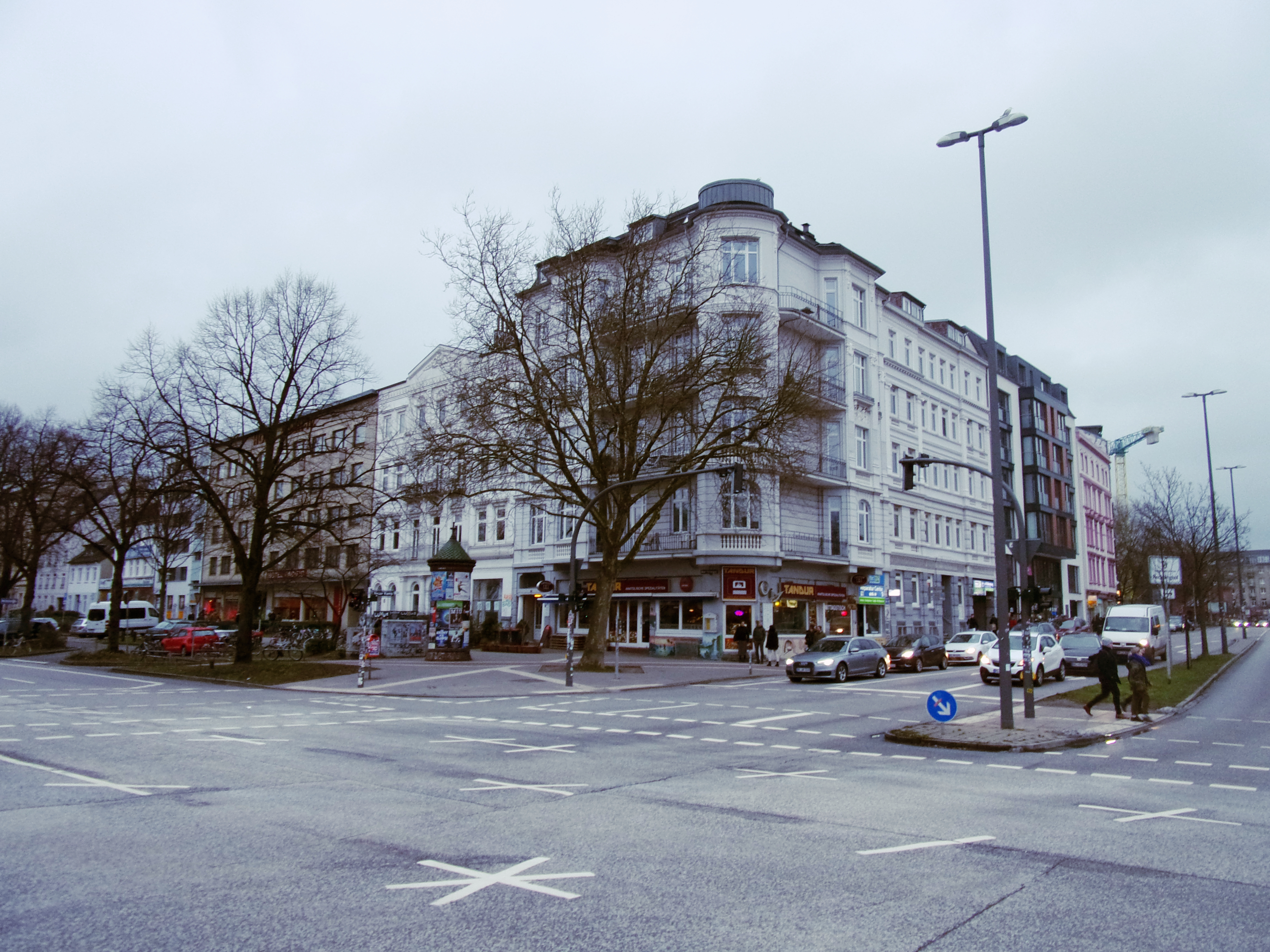 Ensemble Neuer Pferdemarkt 32-33 Ecke Neuer Kamp 1. Das Ensemble besteht aus dem Etagenhaus Neuer Pferdemarkt 32 ( im Foto links ) , dem Eckhaus Neuer Pferdemarkt 33 und dem Wohnhaus Neuer Kamp 1 (im Foto rechts). This is a photograph of an architectural monument.